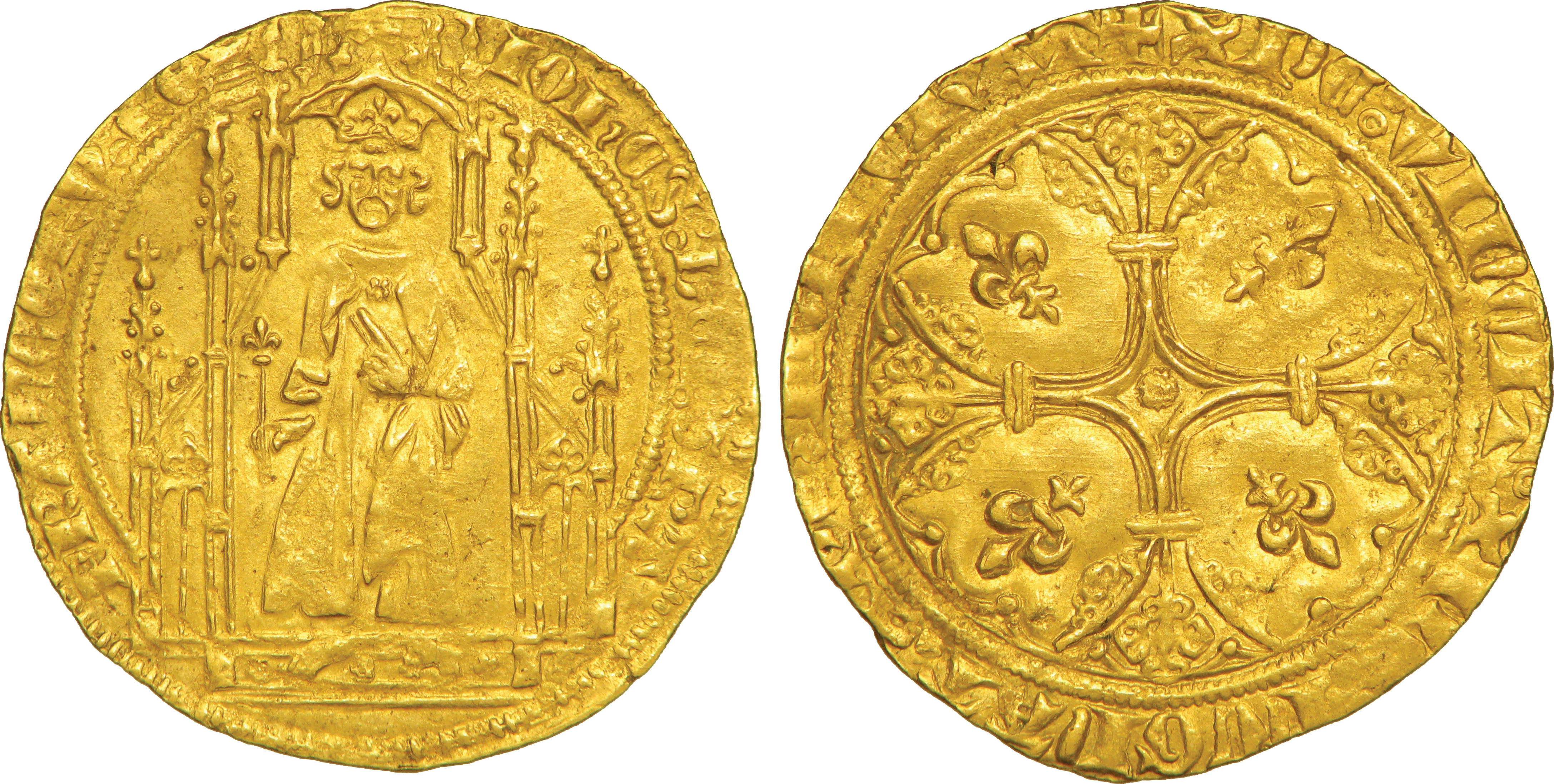 Métal : or Diamètre : 27,5mm Axe des coins : 4h. Poids : 3,42g. Titulature avers : IOh’ES: DEI: GRA - FRAnCORV: REX, (ponctuation par deux annelets pointés superposés). Description avers : Le roi couronné debout de face sous un dais gothique à pinacles, tenant le sceptre fleurdelisé de la main droite. Traduction avers : (Jean, par la grâce de Dieu, roi des Francs). Titulature revers : + XP[’]C: VInCIT: XP’C: REGnAT[: X]PC: I[MP]ERAT, (ponctuation par deux annelets pointés superposés). Description revers : Croix fleuronnée et feuillue, incurvée en cœur, ornée d'un fleuron, cantonnée de quatre lis ; le tout dans un polylobe. Traduction revers : (Le Christ vainc, le Christ règne, le Christ commande). Fabrication: 15 April 1359